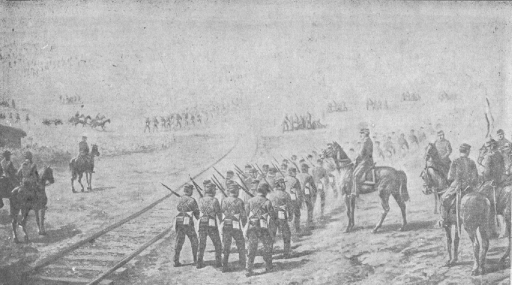 La Batalla de Miraflores fue un enfrentamiento ocurrido el 15 de enero de 1881, entre la fuerzas del Ejército de Chile y el Ejército del Perú, en el marco de la Campaña de Lima, durante la Guerra del Pacífico, ocurrida en el Distrito de Miraflores. El ejército chileno al mando del General Manuel Baquedano, apoyado por tres buques de la armada chilena, derrotó a las fuerzas atrincheradas en parte de la segunda línea defensiva peruana en Miraflores, dirigida por Don Nicolás de Piérola luego de más de cuatro horas de combates. Los reductos de Surco y Ate no combatieron. Dos días después de esta batalla el Ejército de Chile entra a la ciudad de Lima, capital del Perú, el 17 de enero de 1881.